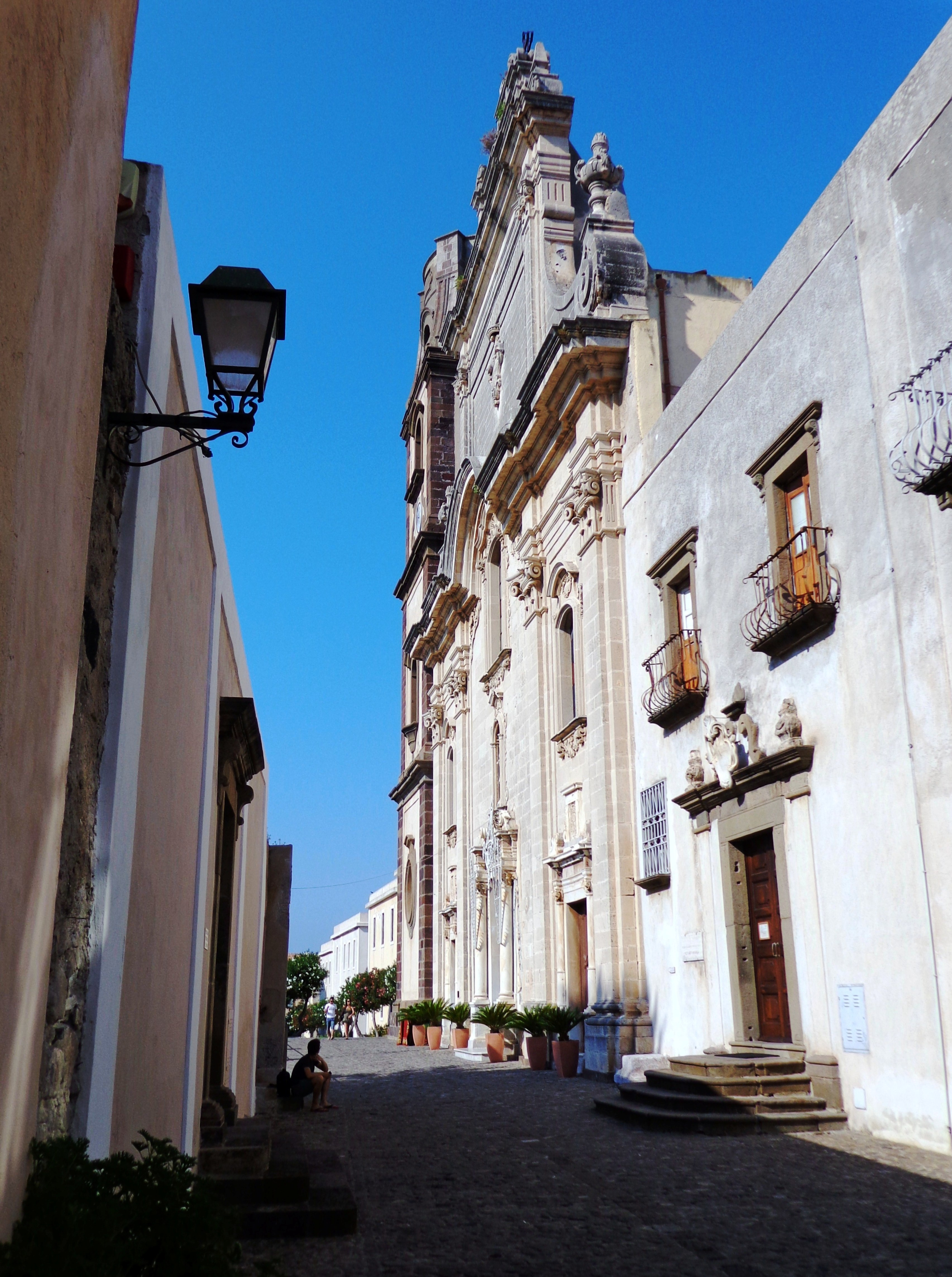 Veduta dalla Necropoli